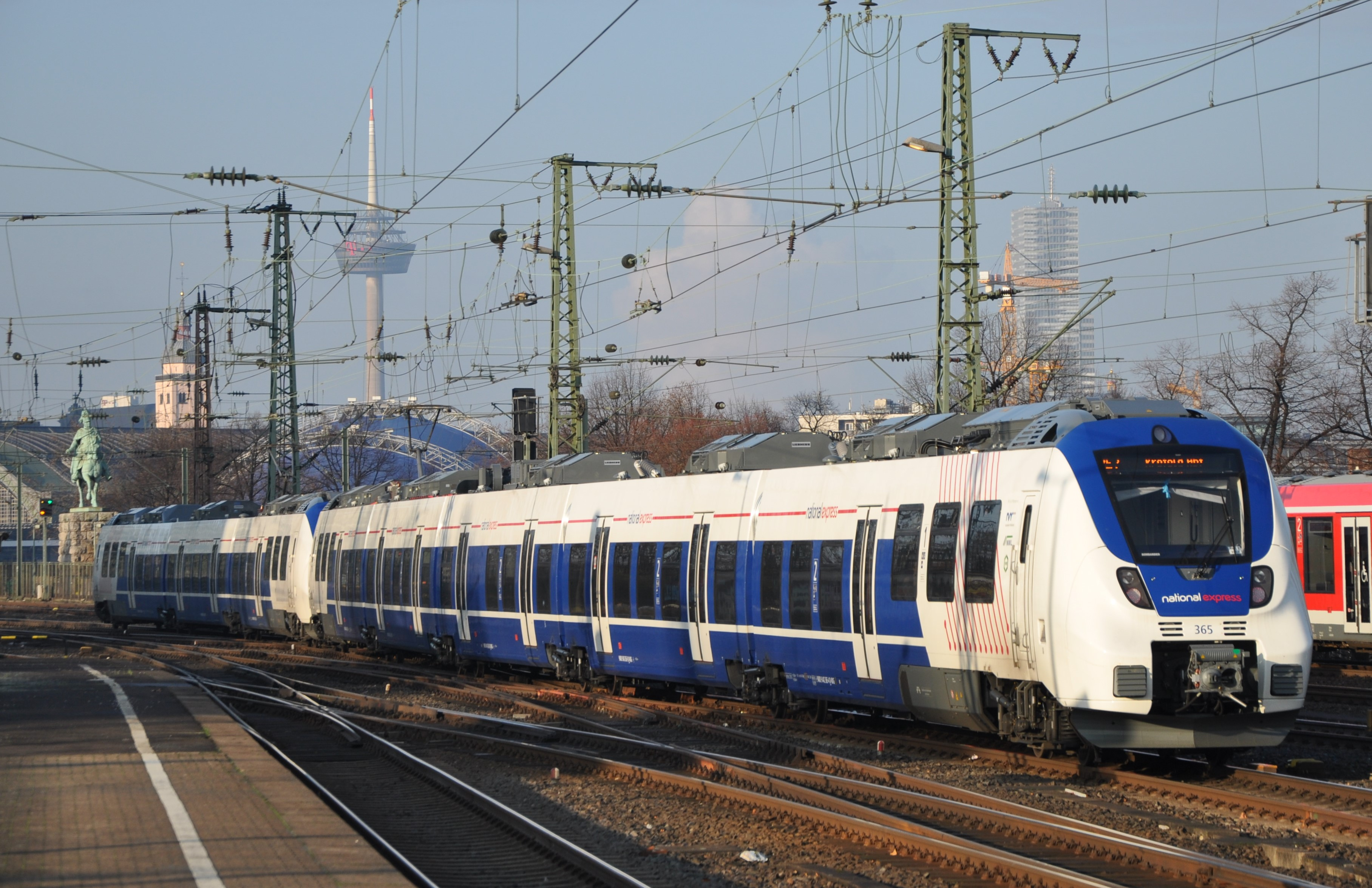 Rhein-Münsterland-Express verlässt Köln Messe/Deutz